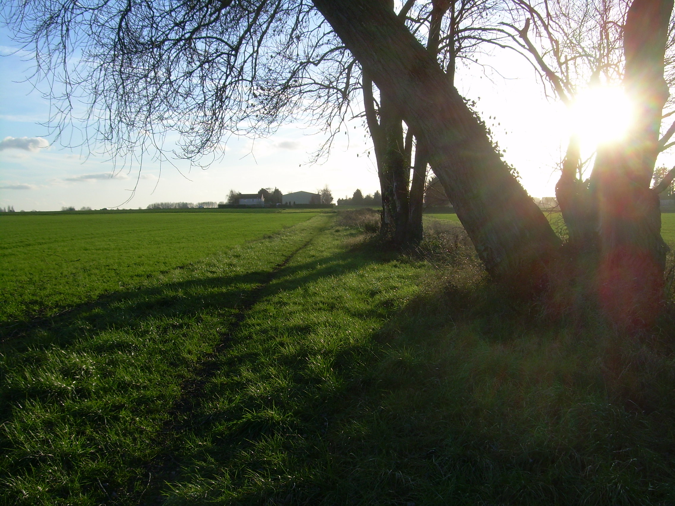 Sente des Solitaires,nommée ainsi car le sentier égarait les promeneurs dans le bois des Templiers.